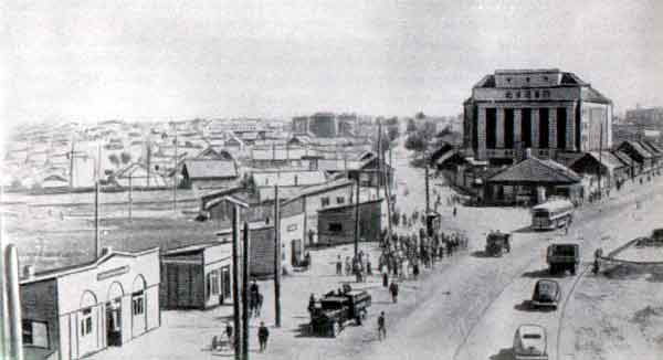 Площадь и улица Якуба Коласа перед войной